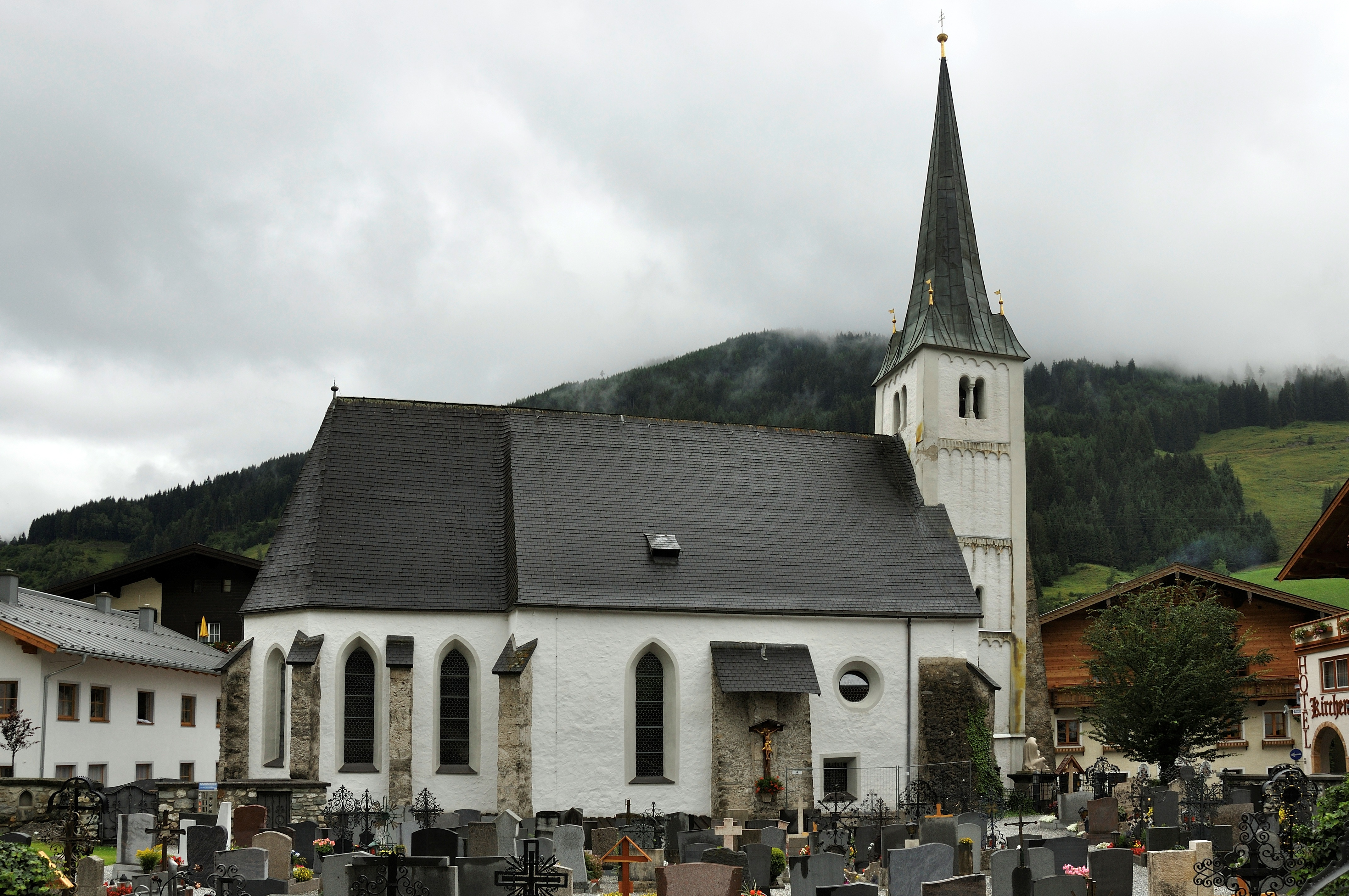 Die Kath. Pfarrkirche hll. Rupert und Virgil in Dorfgastein.